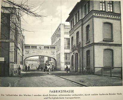 Nordhorn